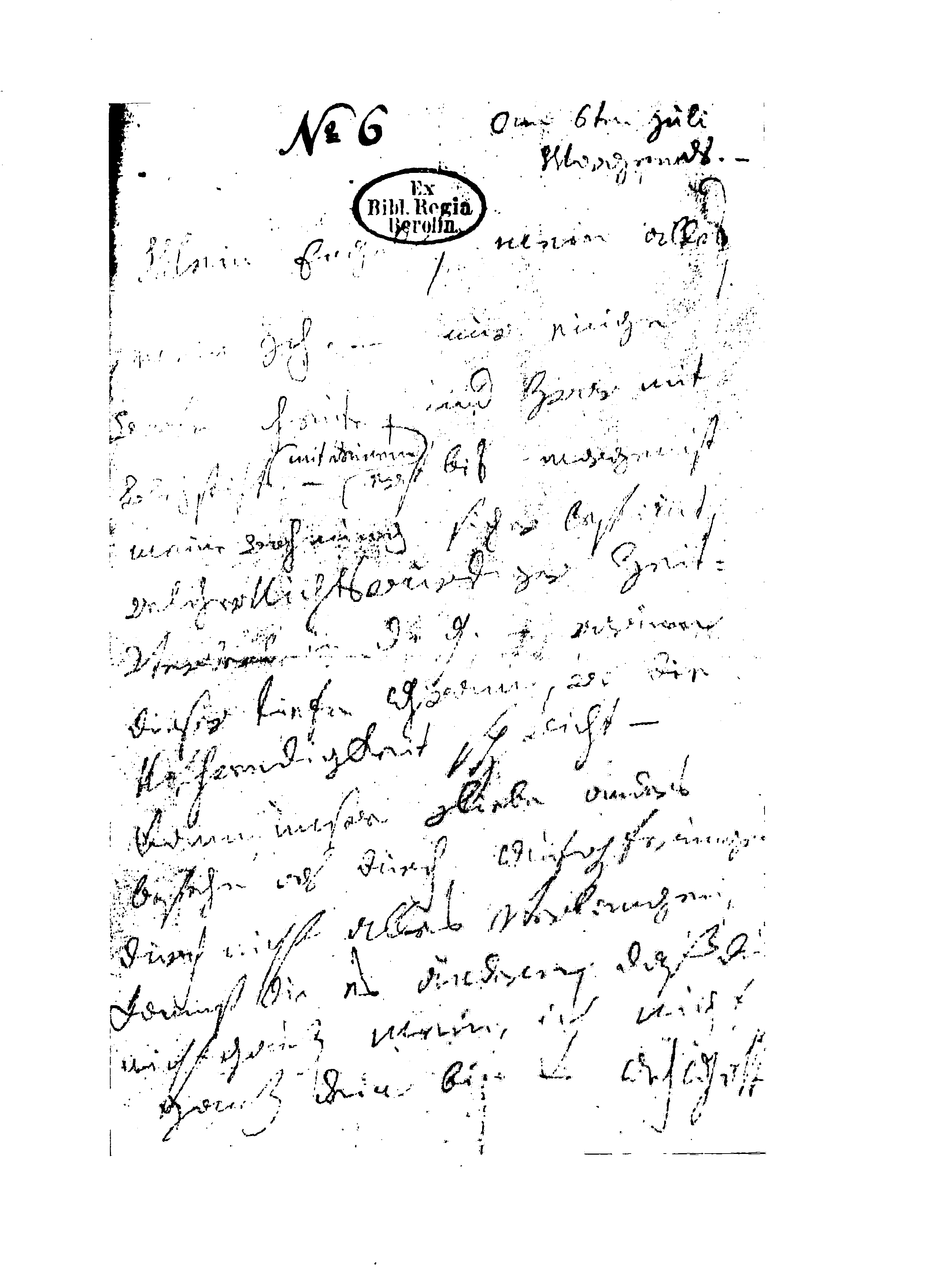 Faksimile des Briefes von Ludwig van Beethoven vom 6./7. Juli 1812 aus Teplitz an eine unbekannte Adressatin, genannt die "Unsterbliche Geliebte".